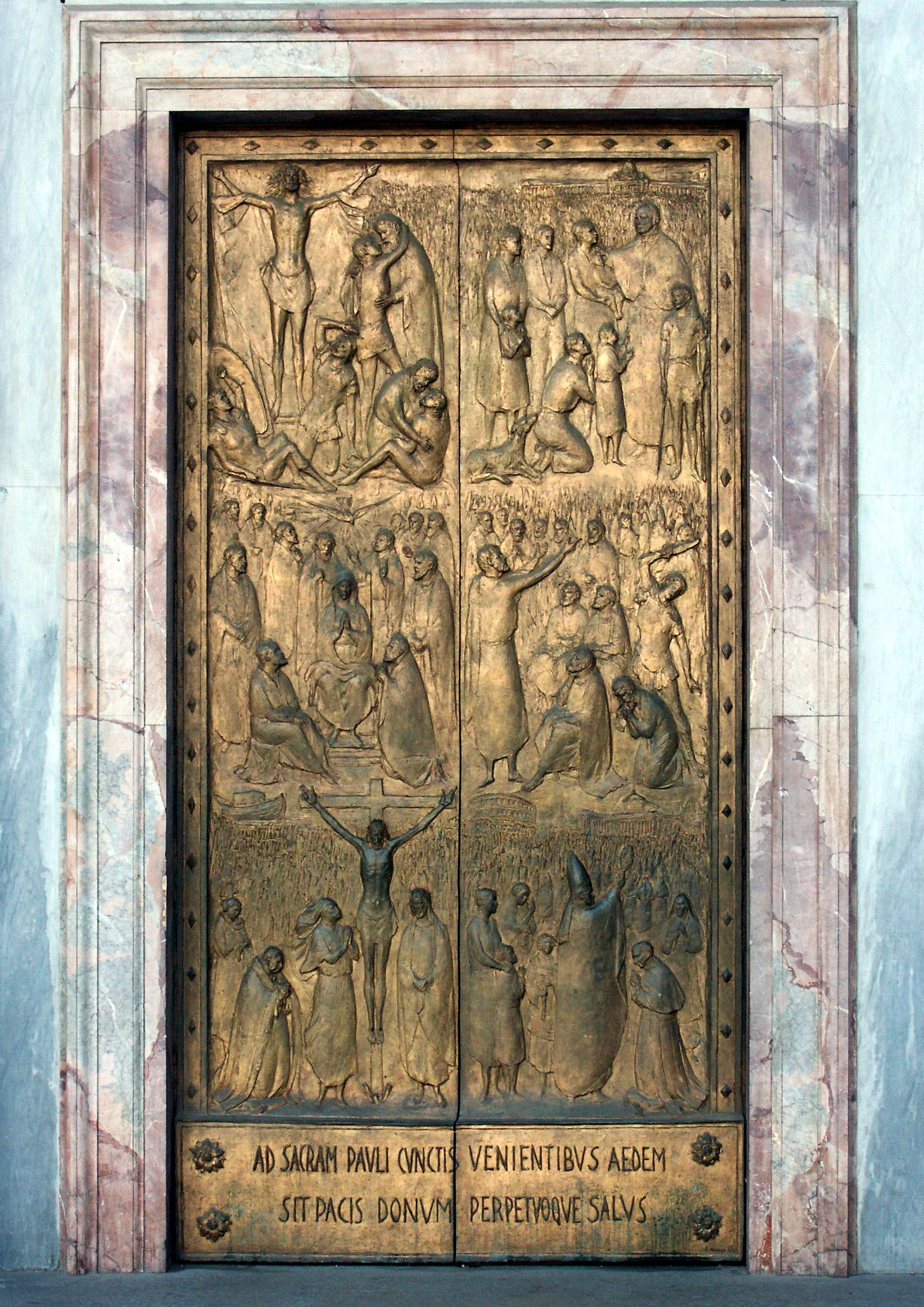 Rom, Sankt Paul vor den Mauern (San Paolo fuori le mura), Heilige Pforte